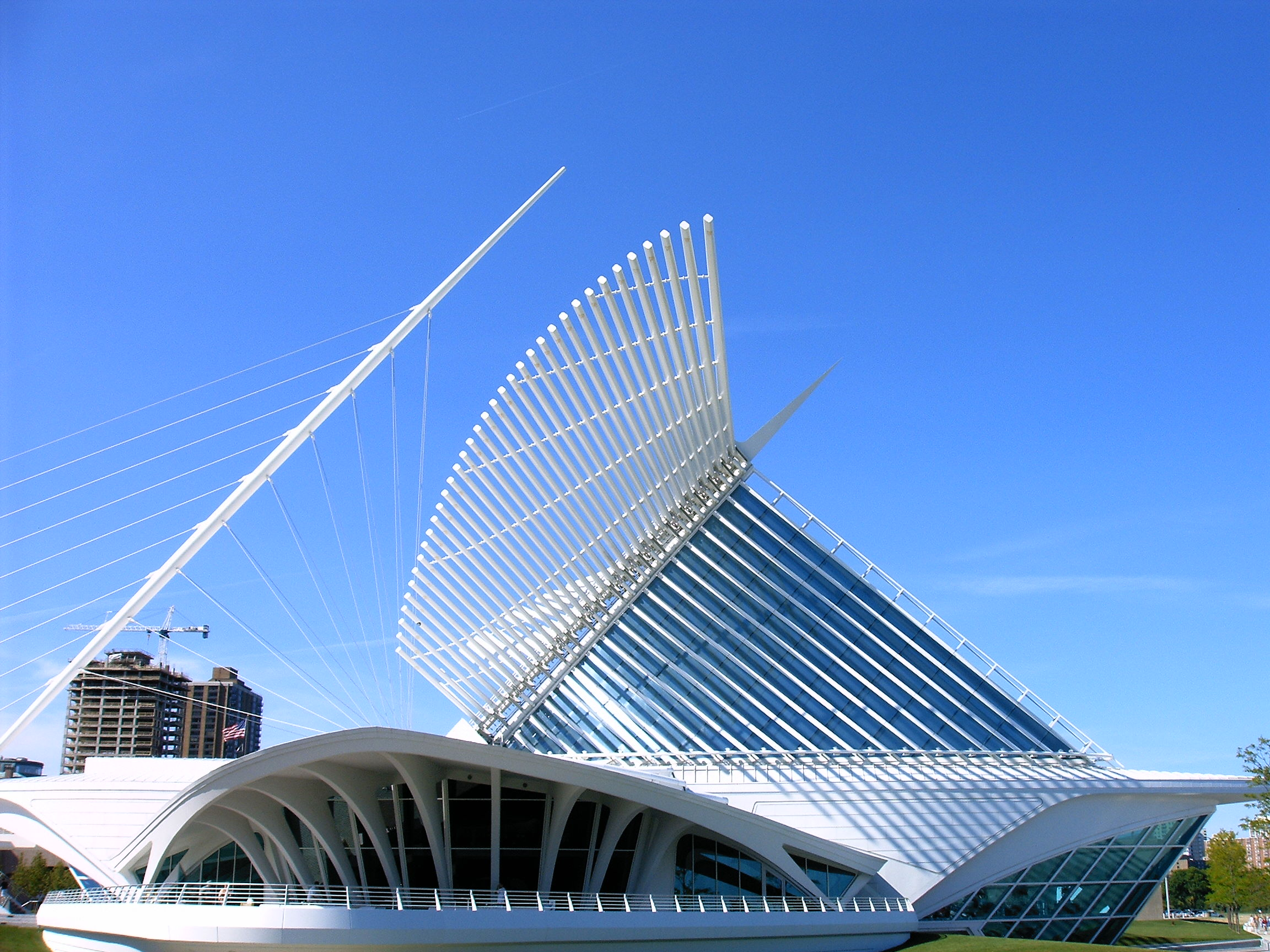 Milwaukee Art MuseumMilwakee Art Museum